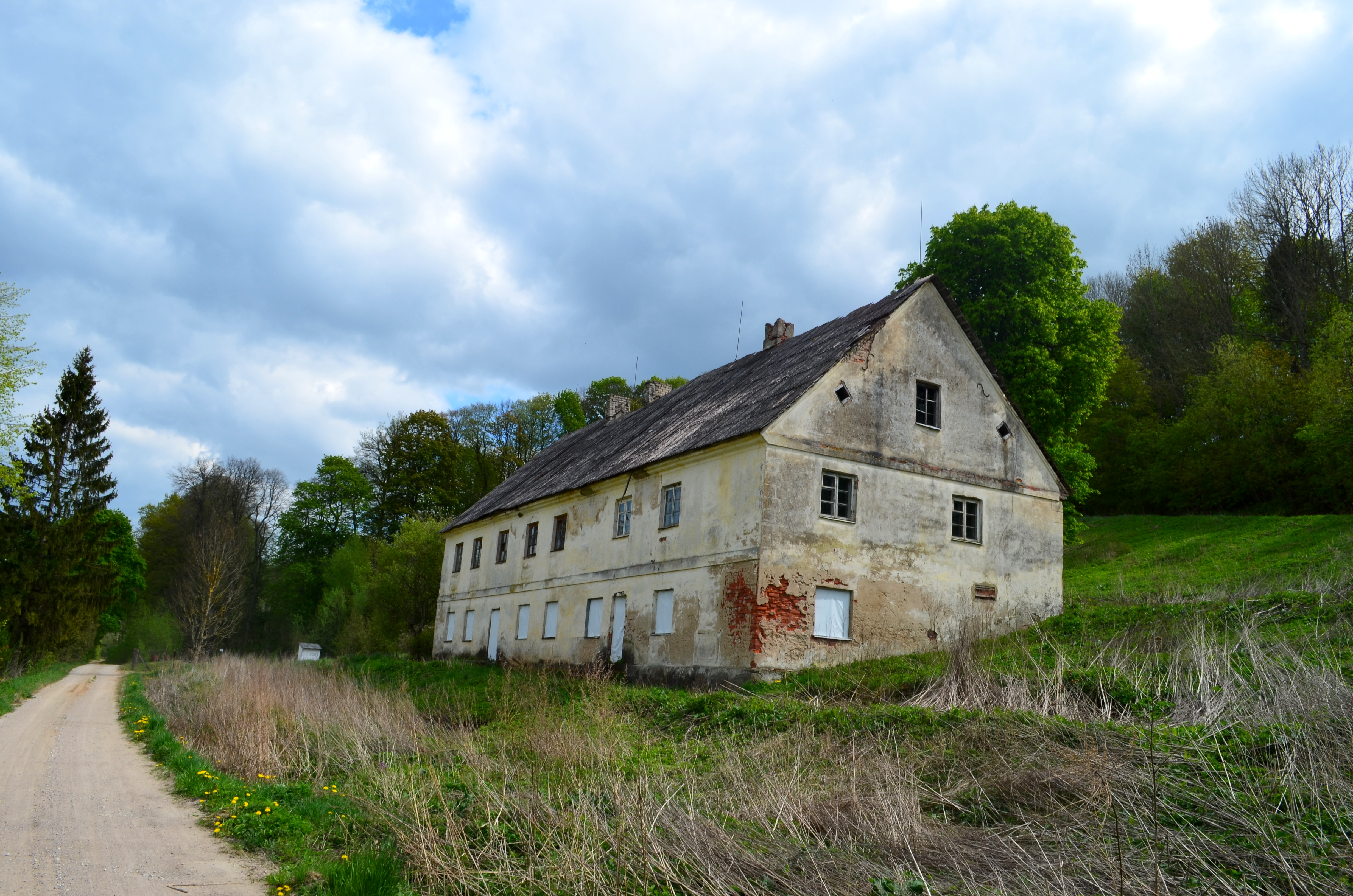 Ilguvos dvaro kumetynas, Šakių raj.